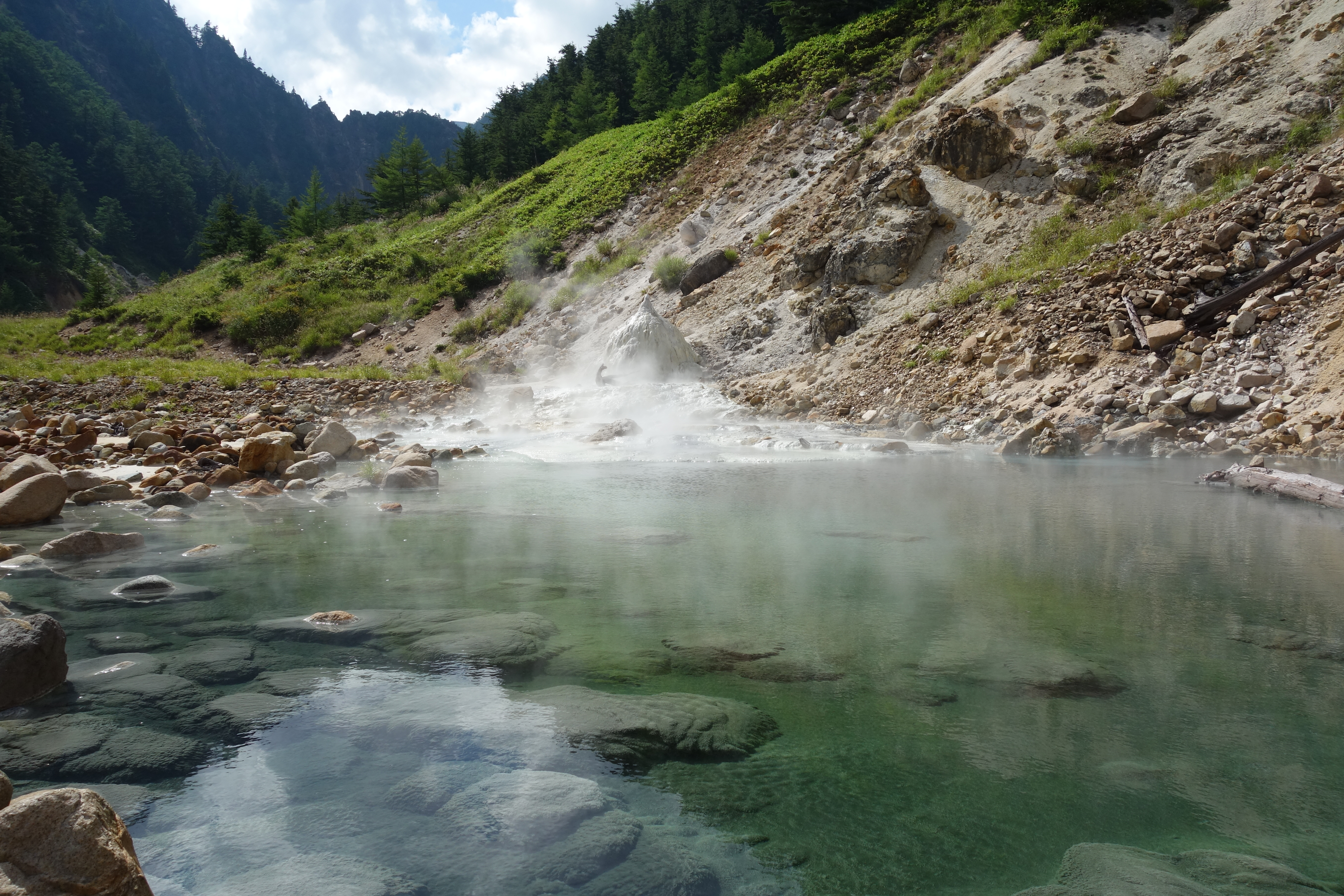 高瀬渓谷の噴湯丘2